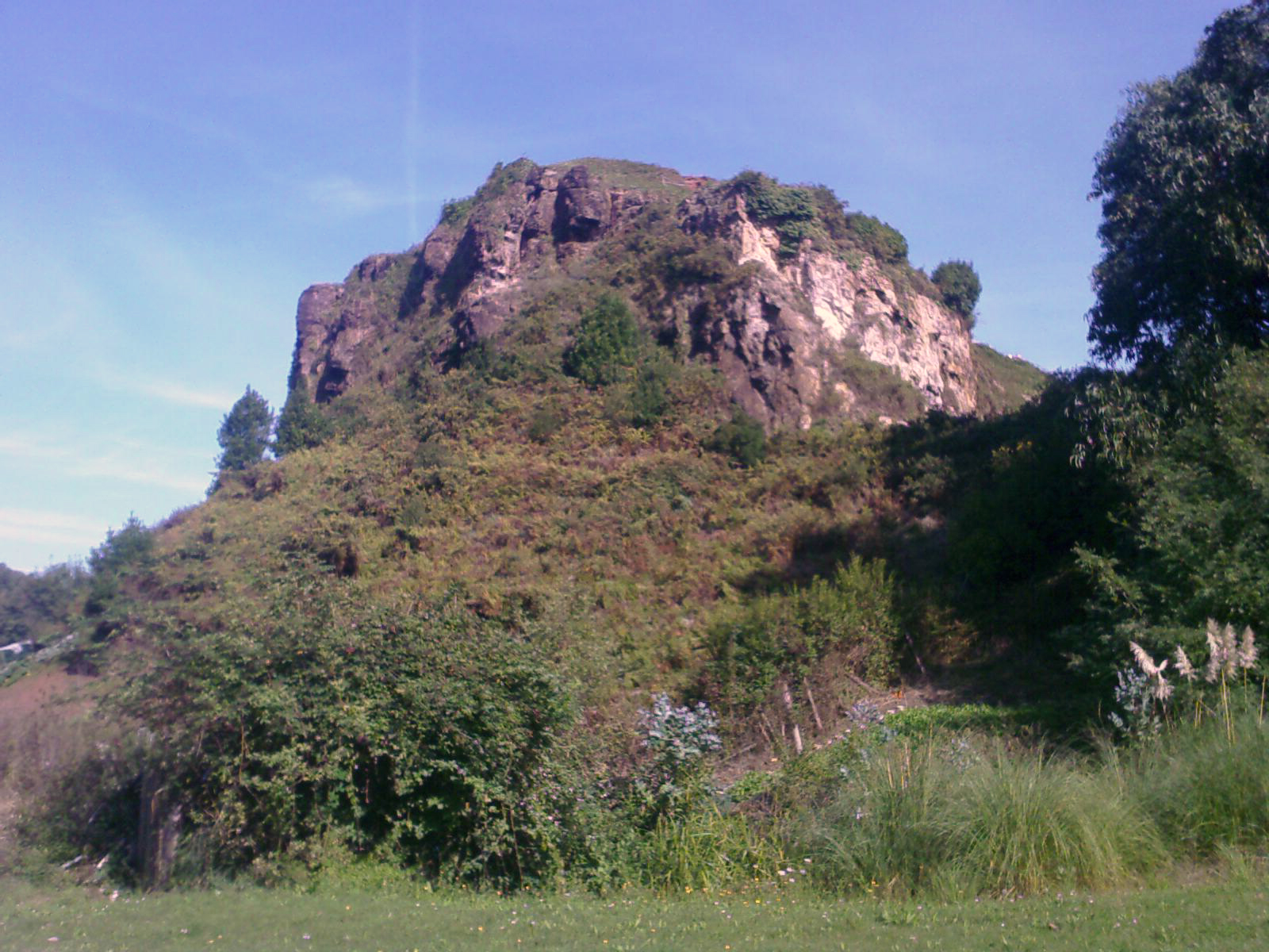 Vista del Peñón de Raíces (Castrillón, Asturias, España). View of Peñón de Raíces (Castrillón, Asturias, Spain)